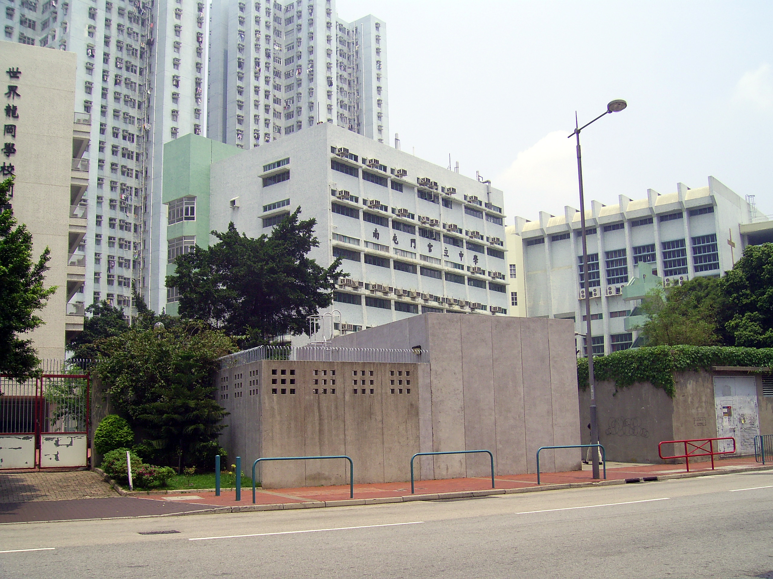 中文（香港）: 南屯門官立中學